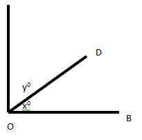 नेपाली: समपूरक कोण